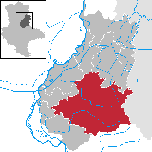 Möckern im Landkreis Jerichower Land, Sachsen-Anhalt